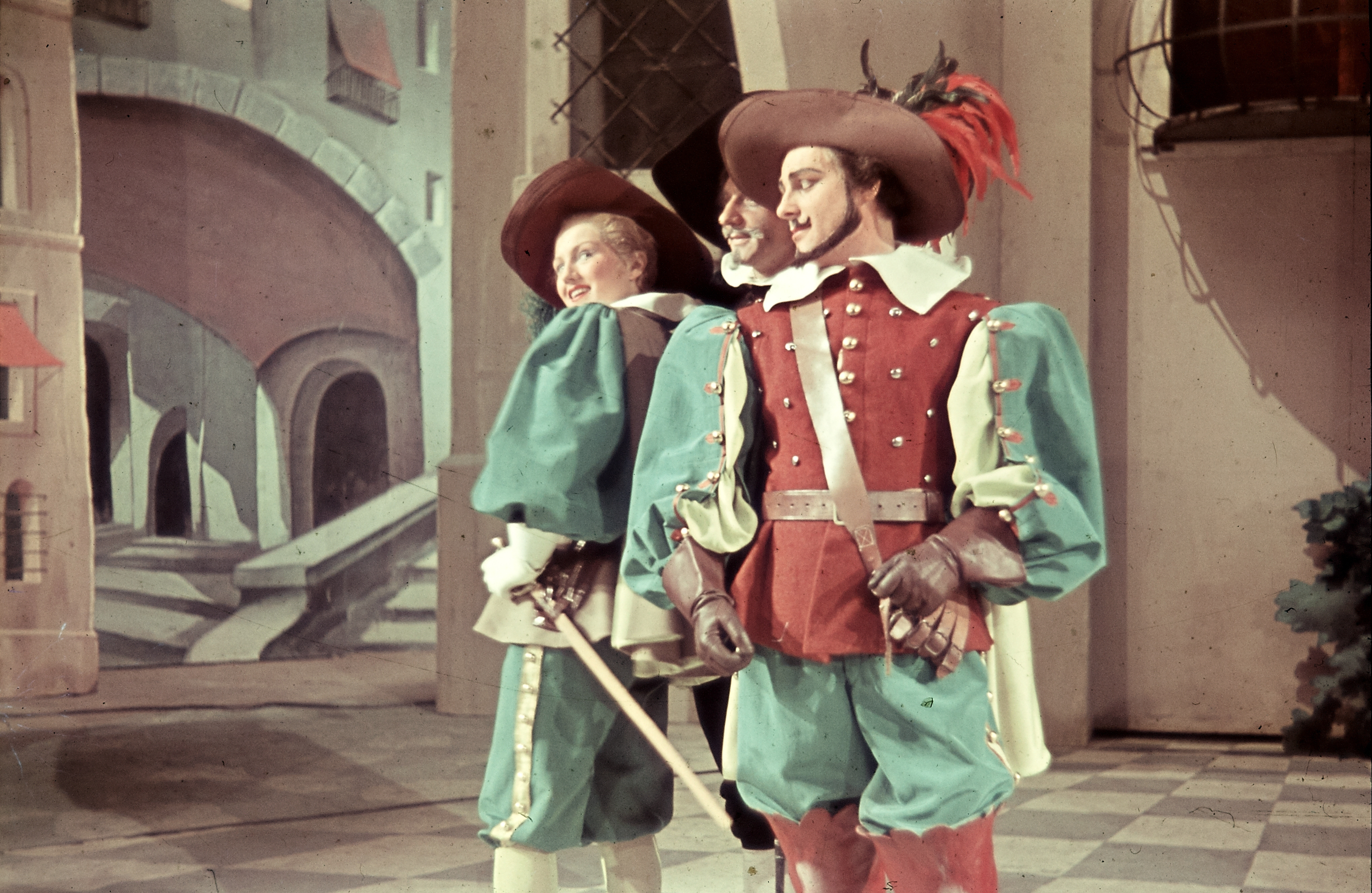 a Nemzeti Színház előadása: A zöld nadrágos lovag. Balra Szörényi Éva, középen Garamszeghy Sándor, jobbra Ungváry László. Location: Hungary, Budapest VIII. Tags: art of theater, colorful, actor, Budapest Title: a Nemzeti Színház előadása: A zöld nadrágos lovag. Balra Szörényi Éva, középen Garamszeghy Sándor, jobbra Ungváry László.